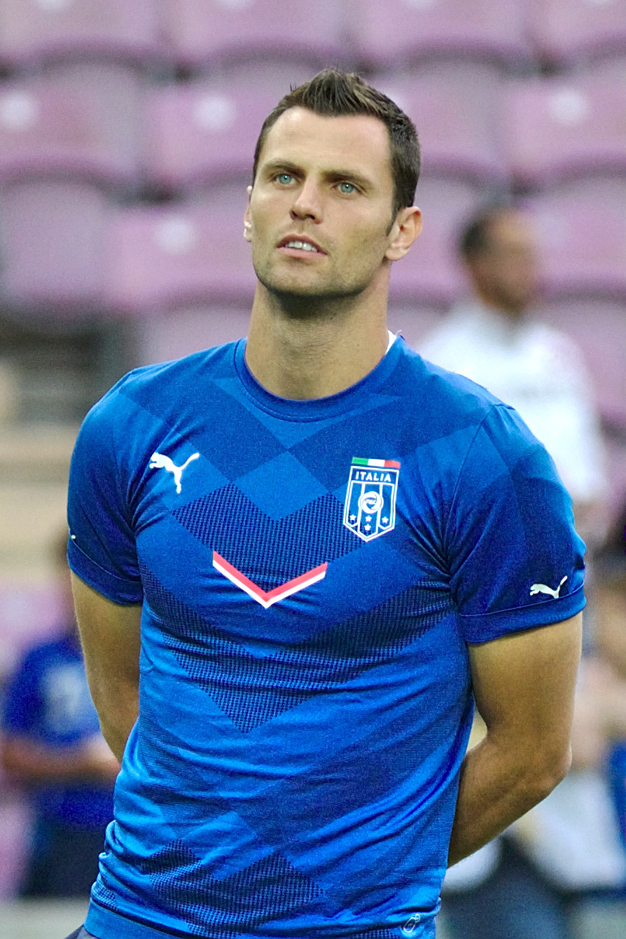 20150616 - Portugal - Italie - Genève - Daniele Padelli